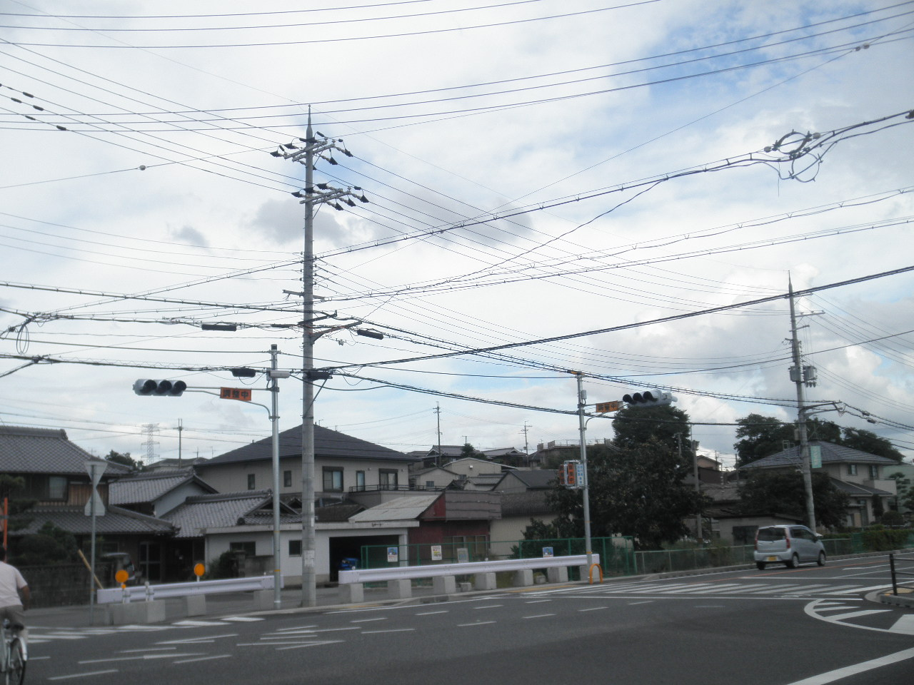 調整中の信号機